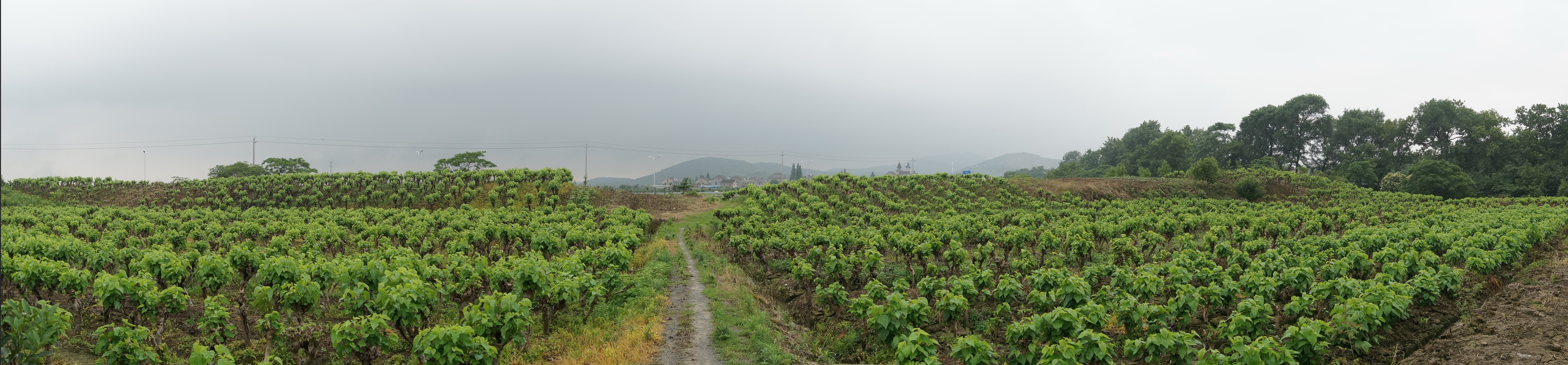 石墩巡检司城遗址，自城内望东城墙。